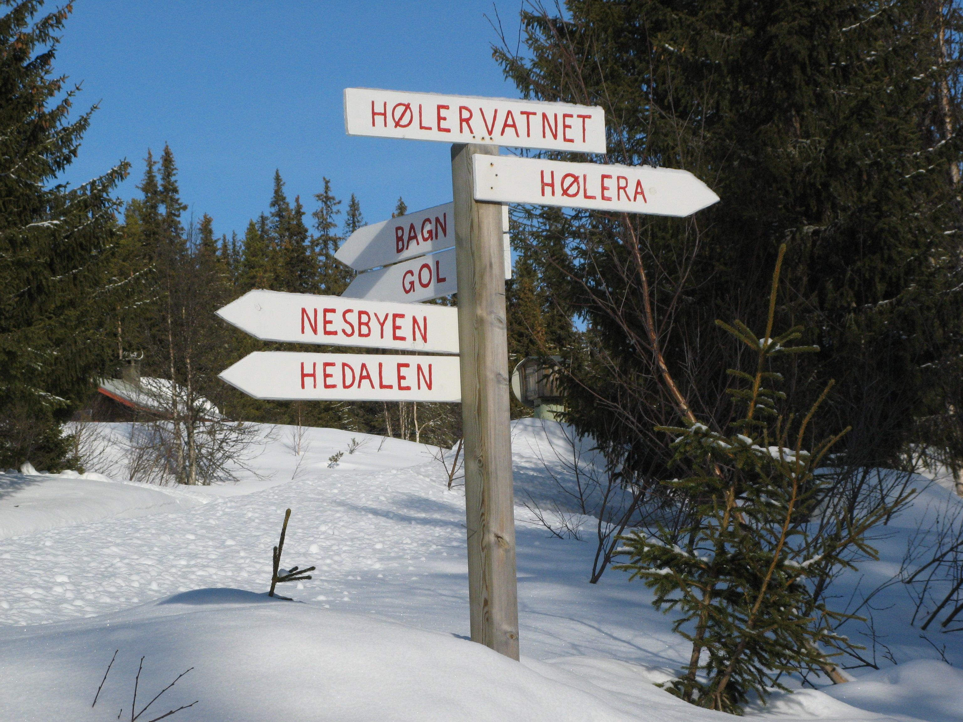 Richtungen